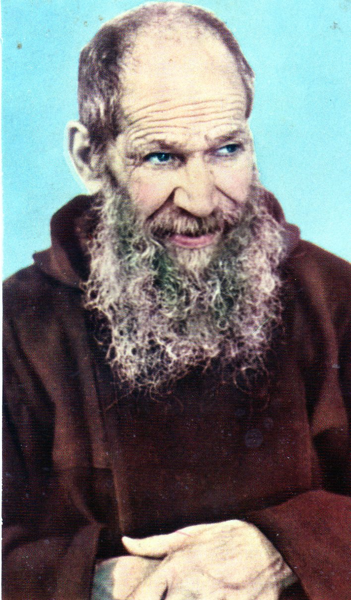 ritratto del Beato Nicola da Gesturi (+1958), Cagliari